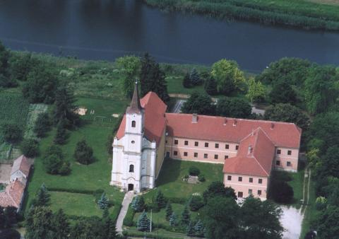 Mesztegnyő, Hungary, aerialphtography. Nepomuki Szent János római katolikus templom